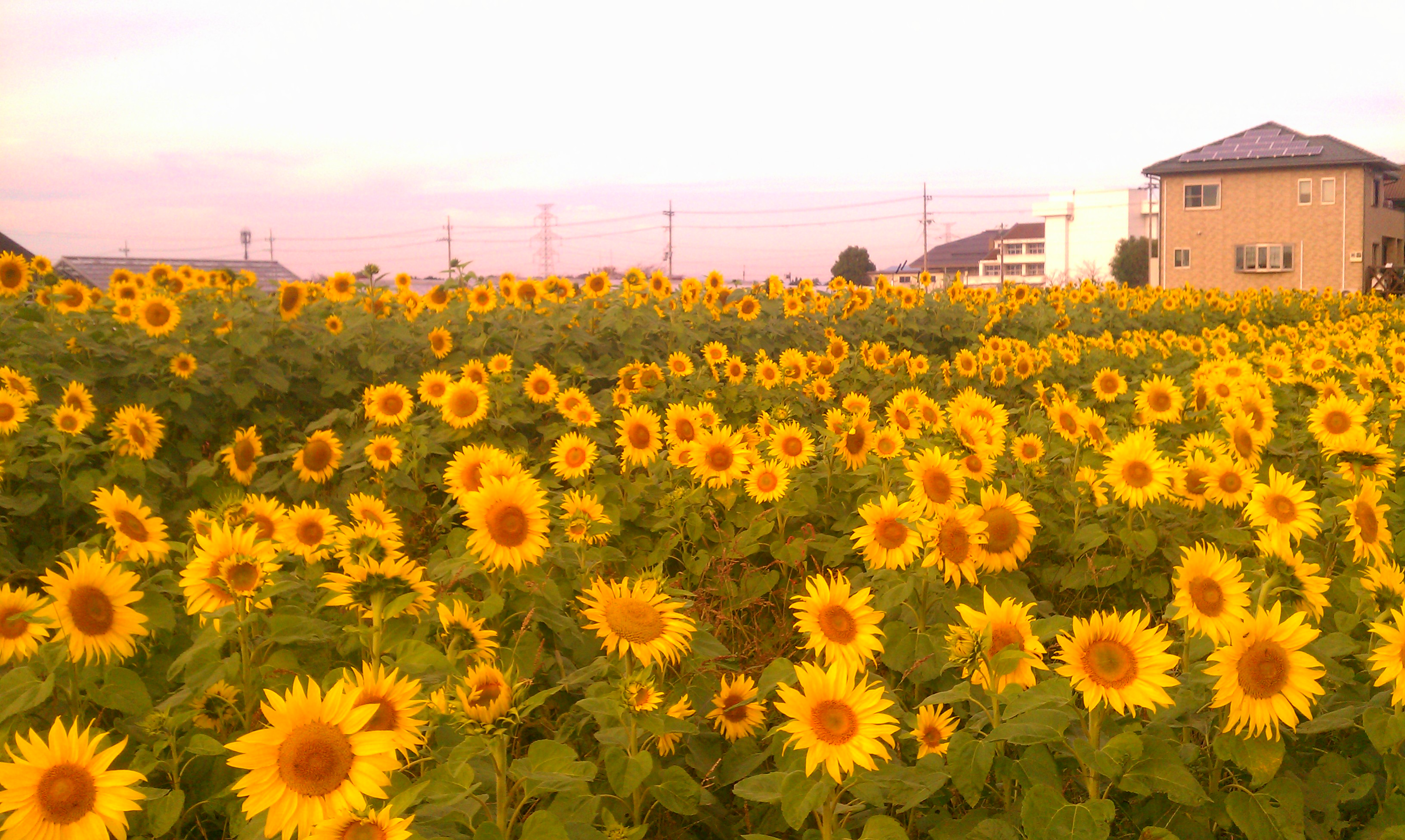 あいとうマーガレットステーション